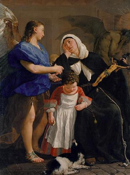 Sainte Marguerite de Cortone